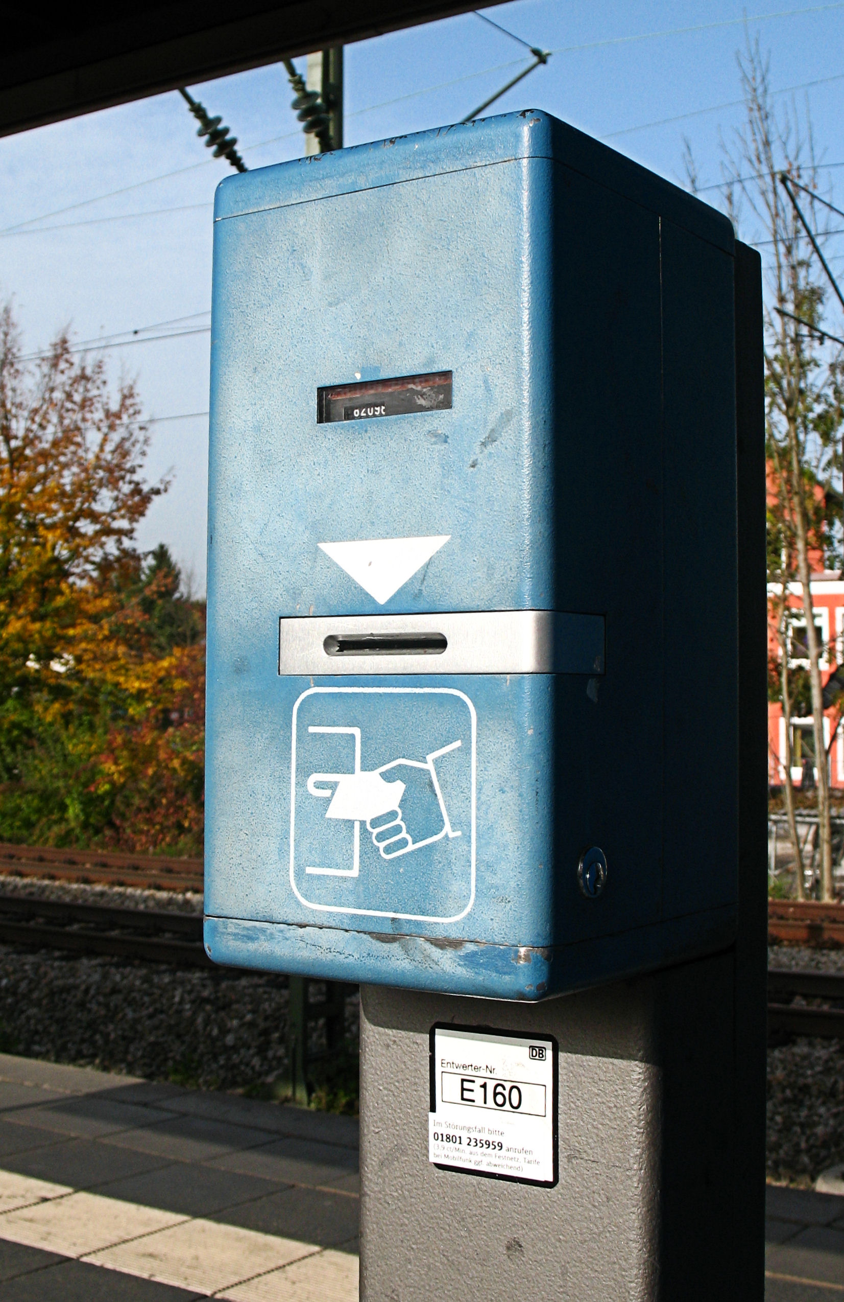 Freistehender Fahrkartenentwerter an einer Münchner S-Bahn-Haltestelle